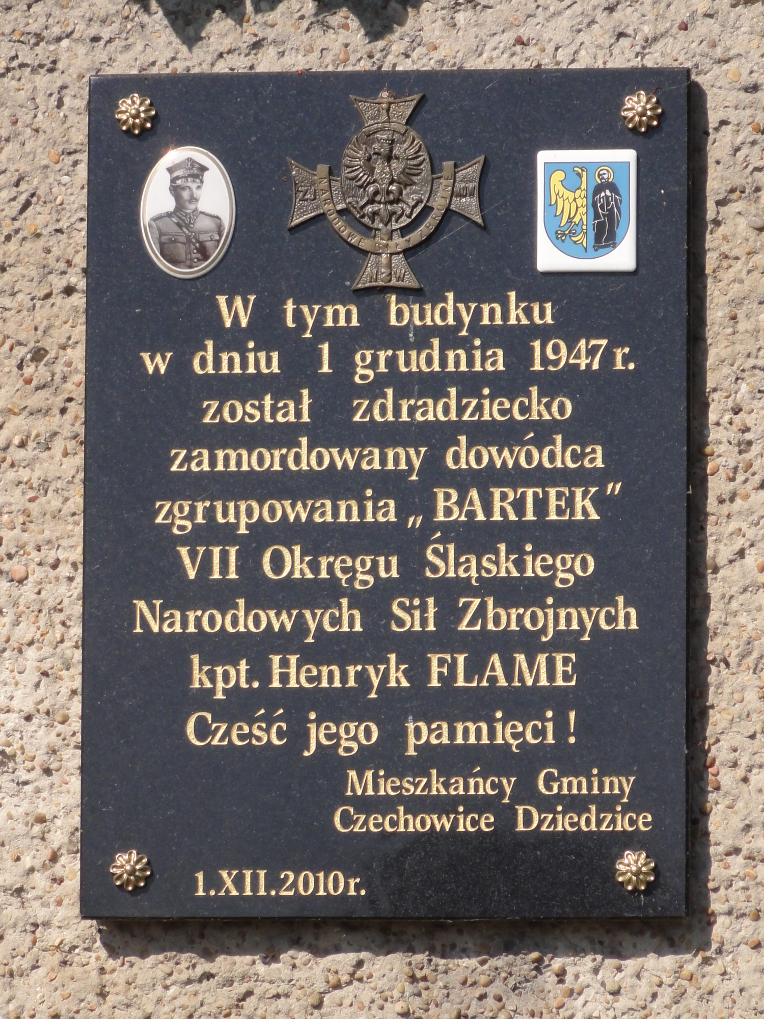 Restauracja pod Zaporą w Zabrzegu - tabliczka upamiętniająca śmierc Henryka Flame